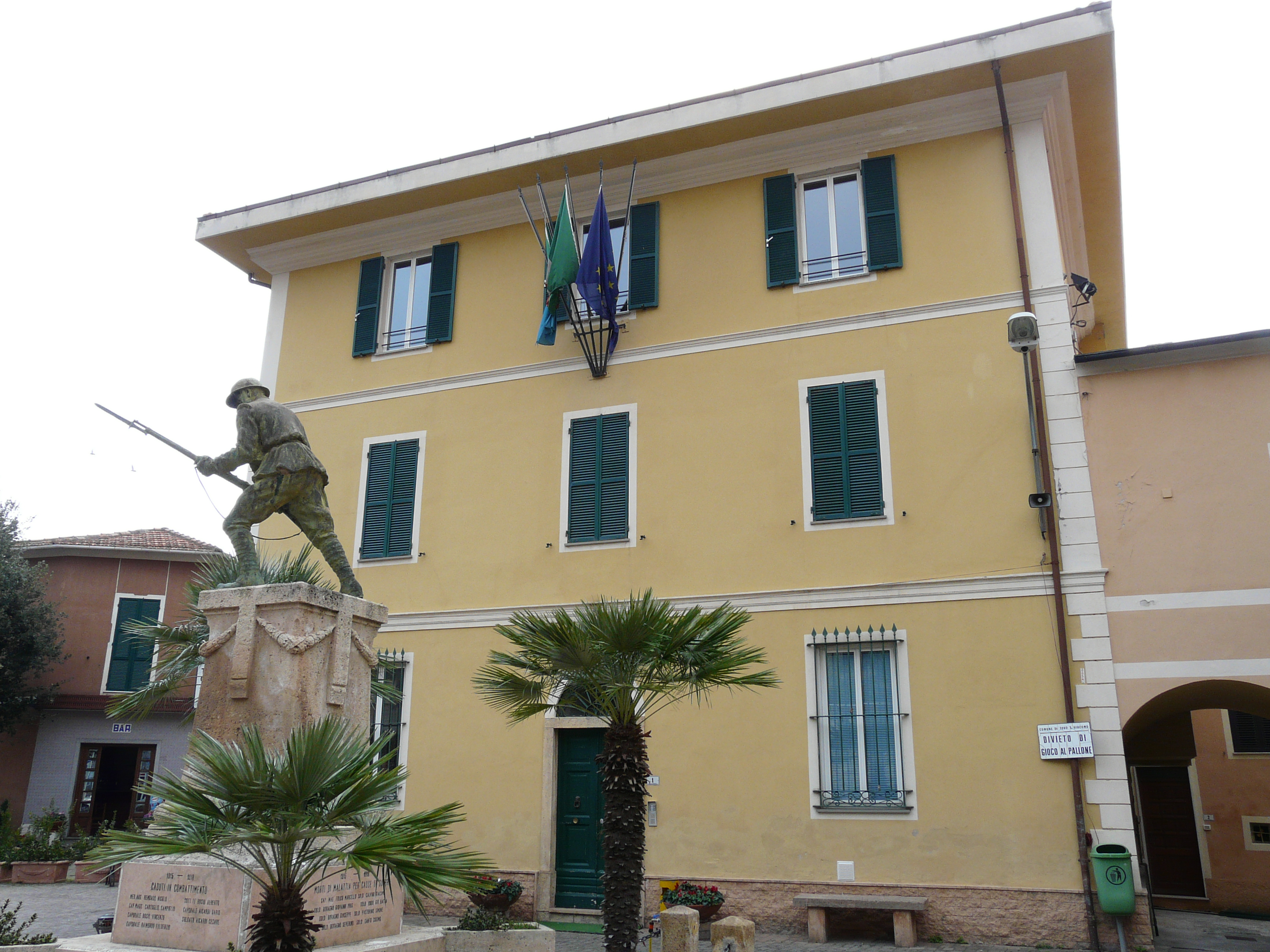 Municipio, Tovo San Giacomo, Liguria, Italia